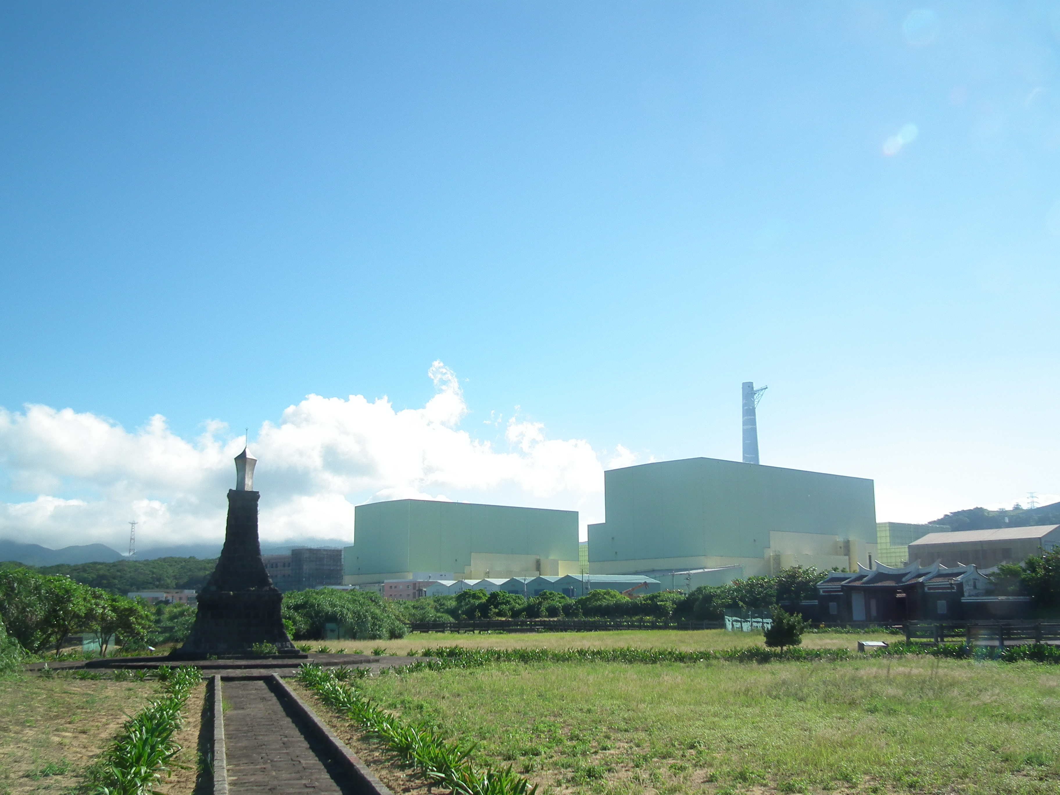 台湾第四原子力発電所。左は塩寮抗日記念碑。